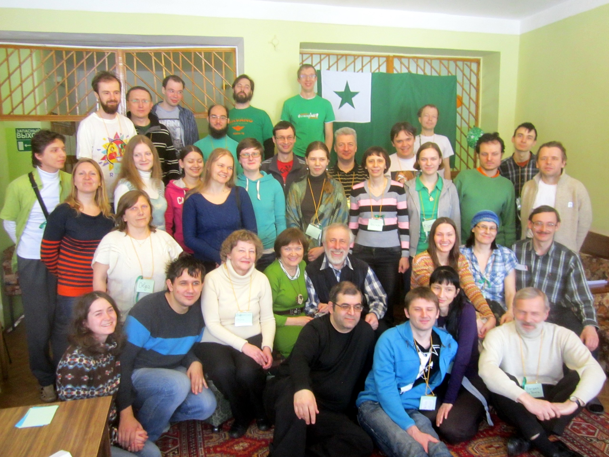 Komuna foto dum APERo-6